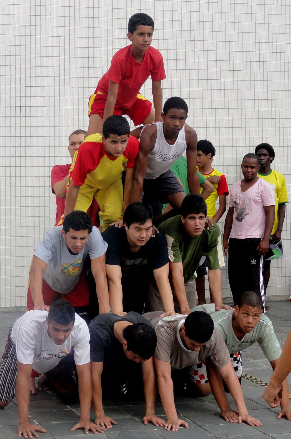 瞬間起立四段ピラミッド。ブラジル、リオデジャネイロでの2011年10月における練習風景。